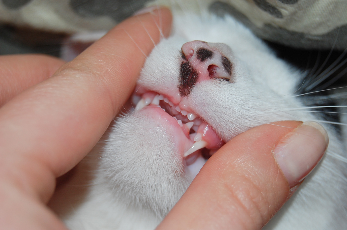 cat's teeth